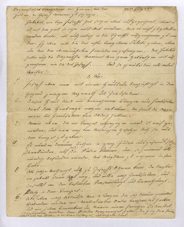 Handschrift Lorbers, Seite 1 von „Die Jugend Jesu”